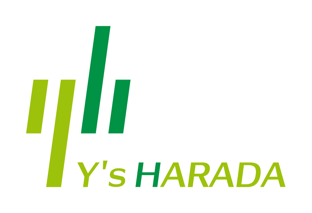 有限会社ワイズ原田のコーポレートロゴ。ロゴデザインは自社で手掛け、使用権利も自社にある。